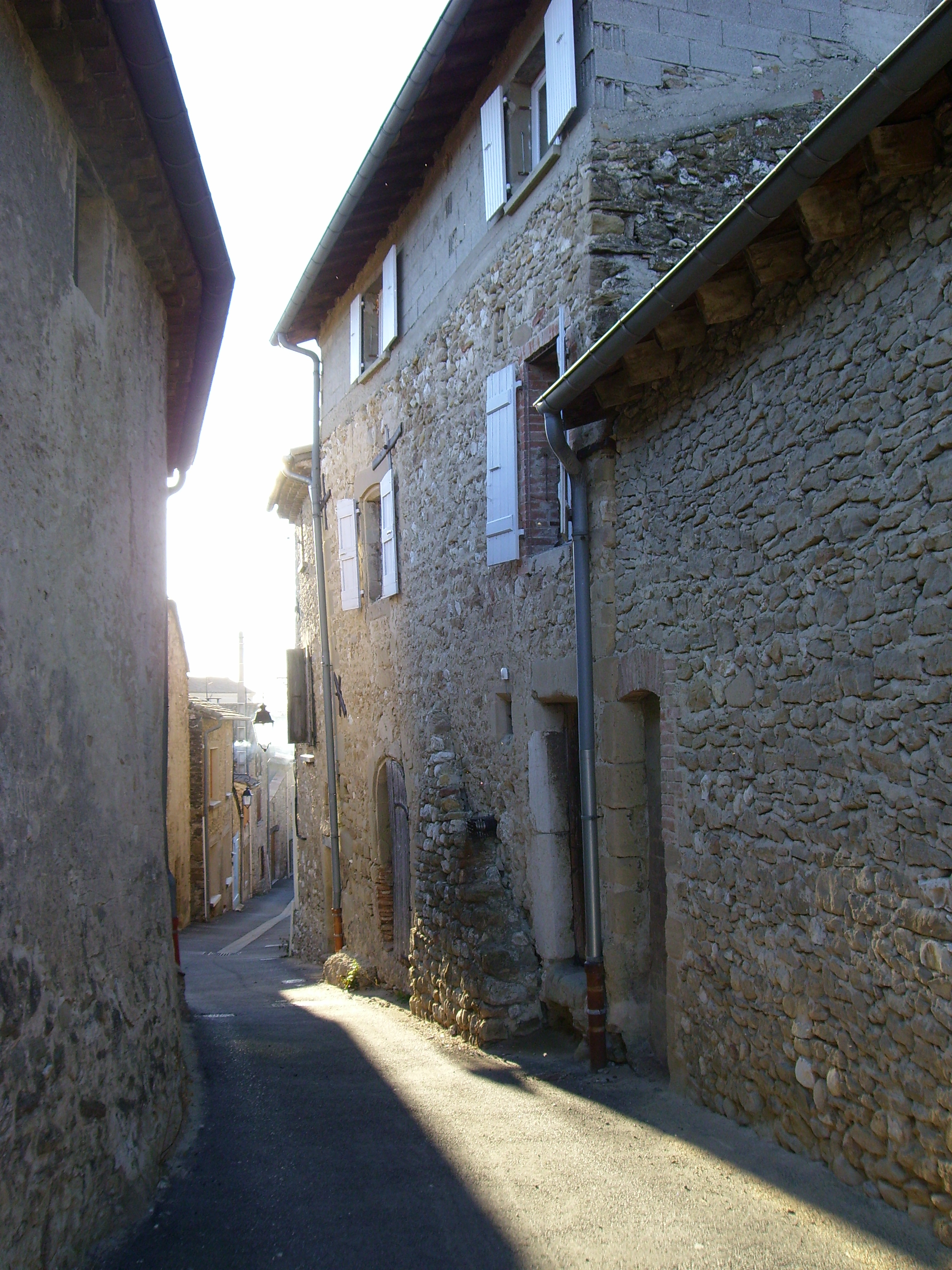 Vieille rue de Montvendre (Drôme)